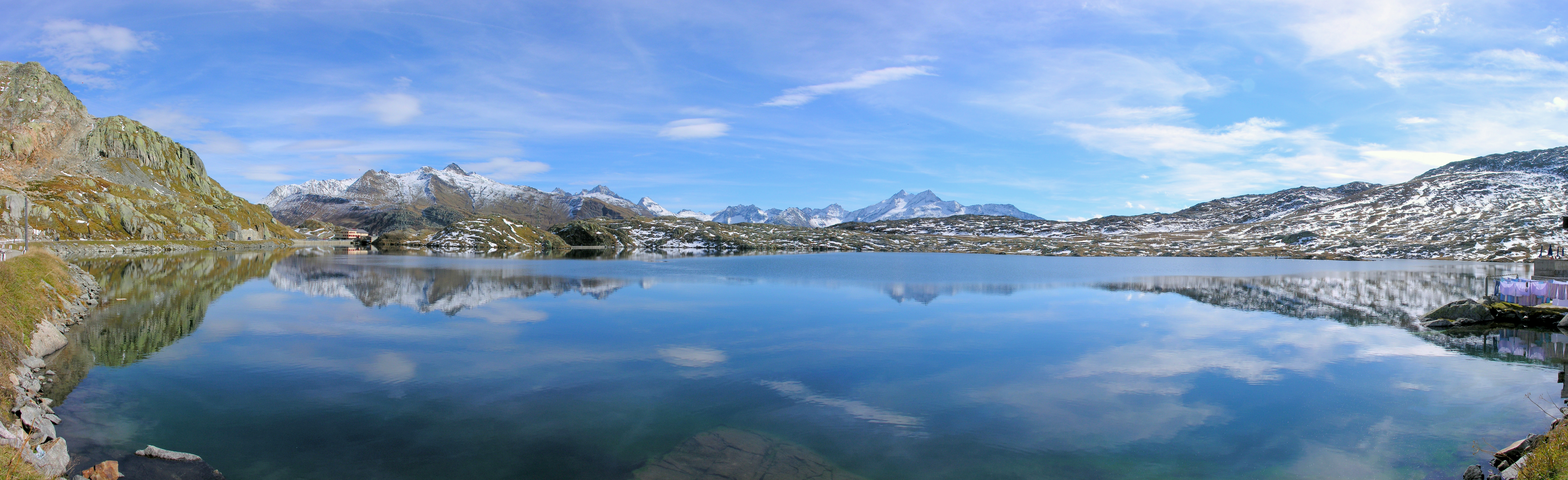 Grimsel Pass